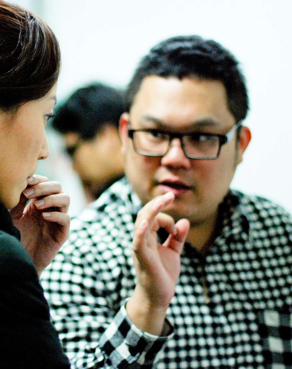 2011與愛別離